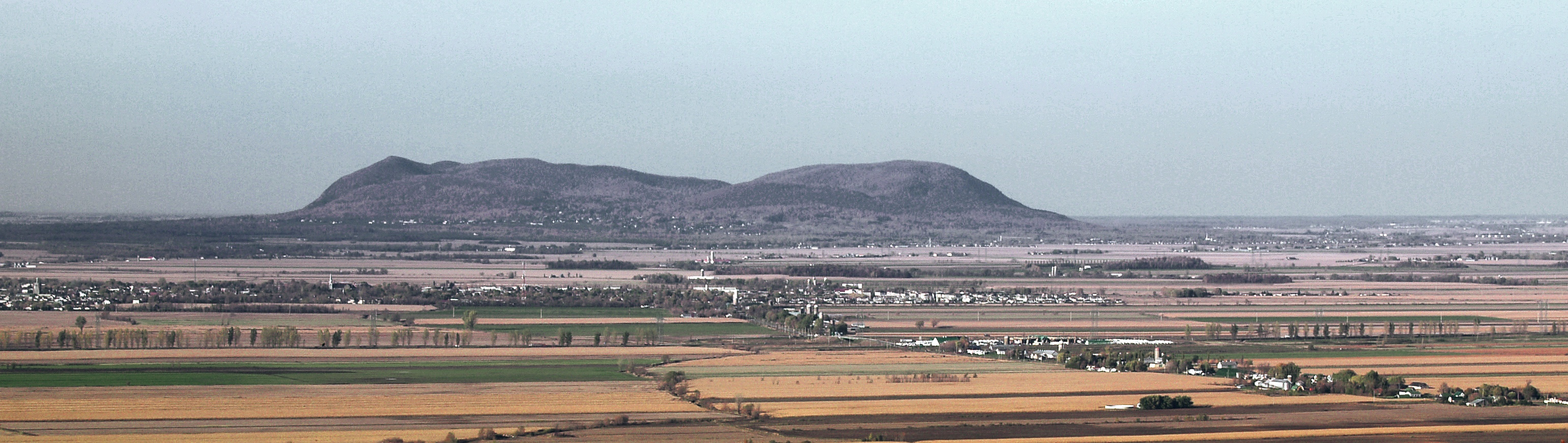 Montagne Rougemont (378 m), vue depuis le Mont St-Grégoire (251 m) situé à 15 km à vol d'oiseau